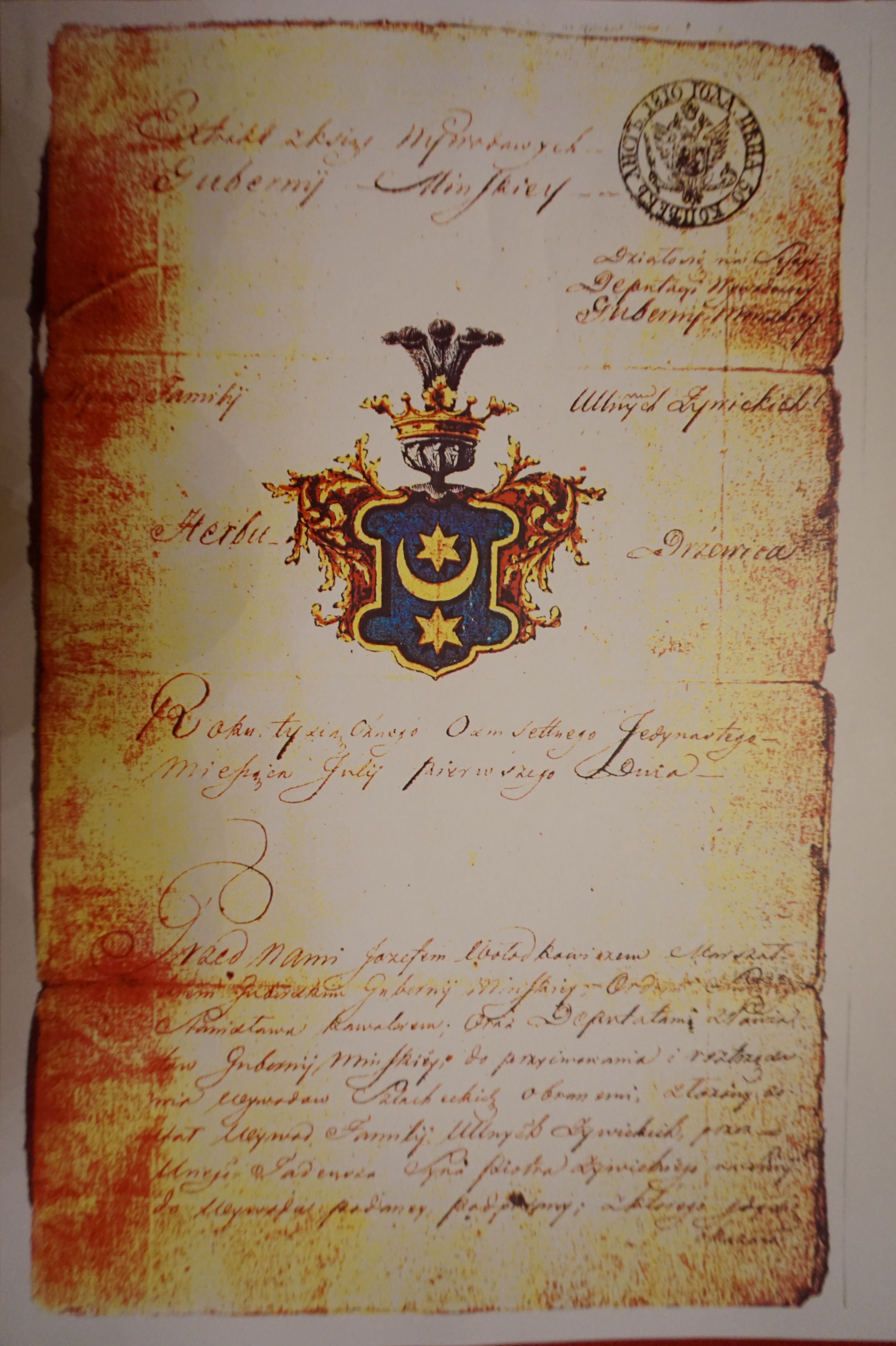 kopia pierwszej strony wywodu Żywickich herbu Drzewica wylegitymowanych ze szlachectwa staropolskiego w 1811 roku przed Deputacją Wywodową Guberni mińskiej zaboru rosyjskiego